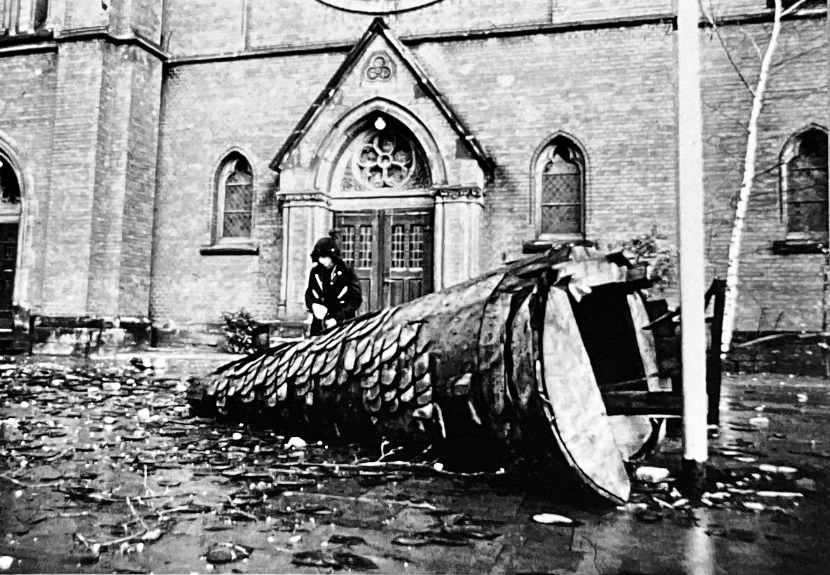 Herabgefallener Fialturm 1976